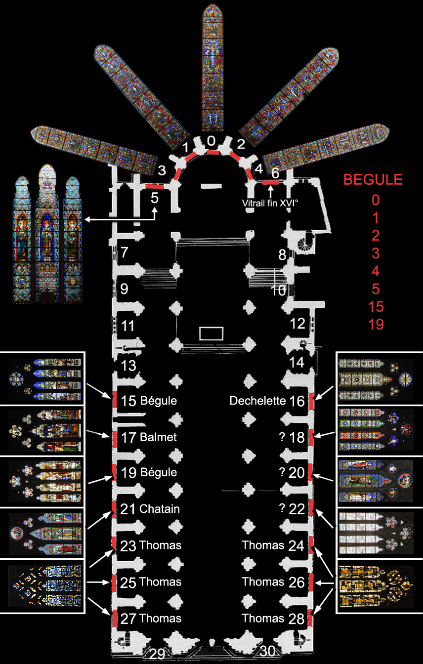 plan de la Cathédrale de Vienne en France